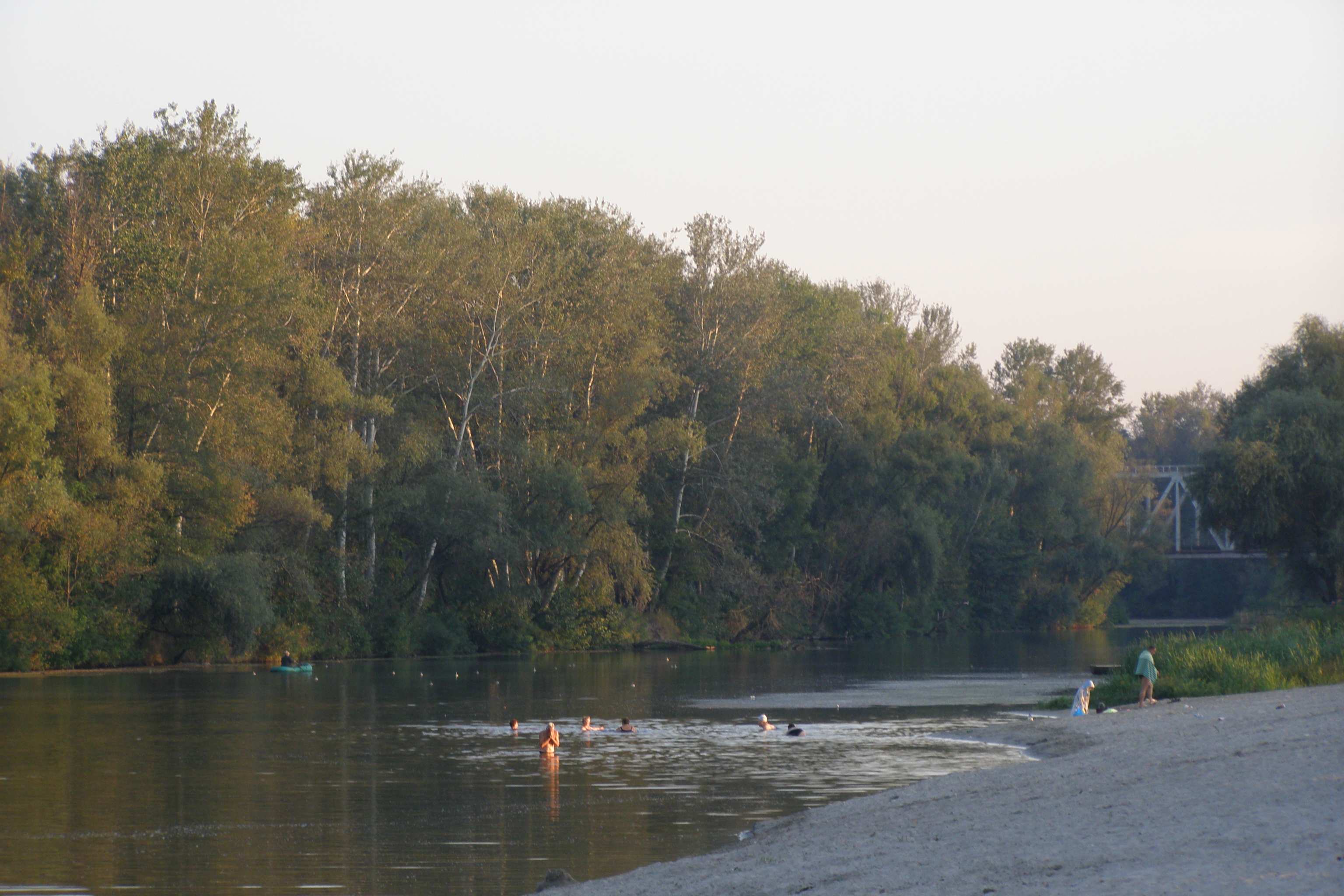 Ворскла. Полтава. Пляж "Хвиля"